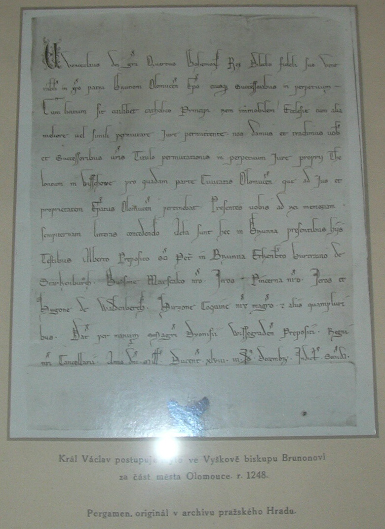 Kopie listiny Krále Václava jenž postupuje mýto ve Vyškově olomouckému biskupovi Brunonovi za část města Olomouce roku 1248.